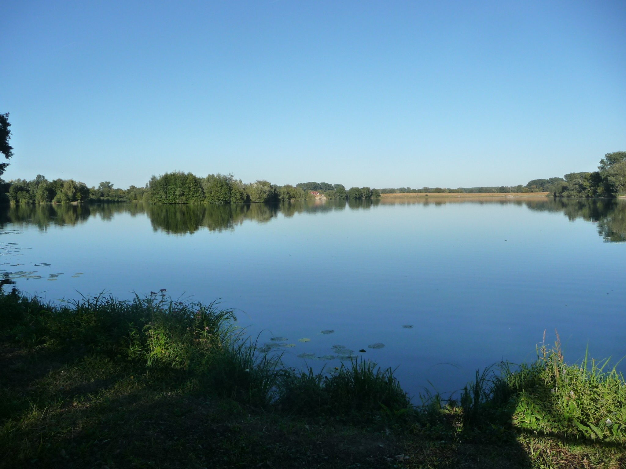 Neupotz im Landkreis Germersheim, südliches Rheinland-Pfalz